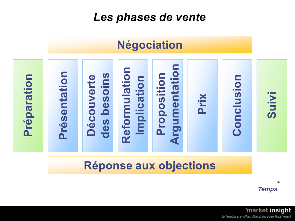 Étapes dans une négociation commerciale